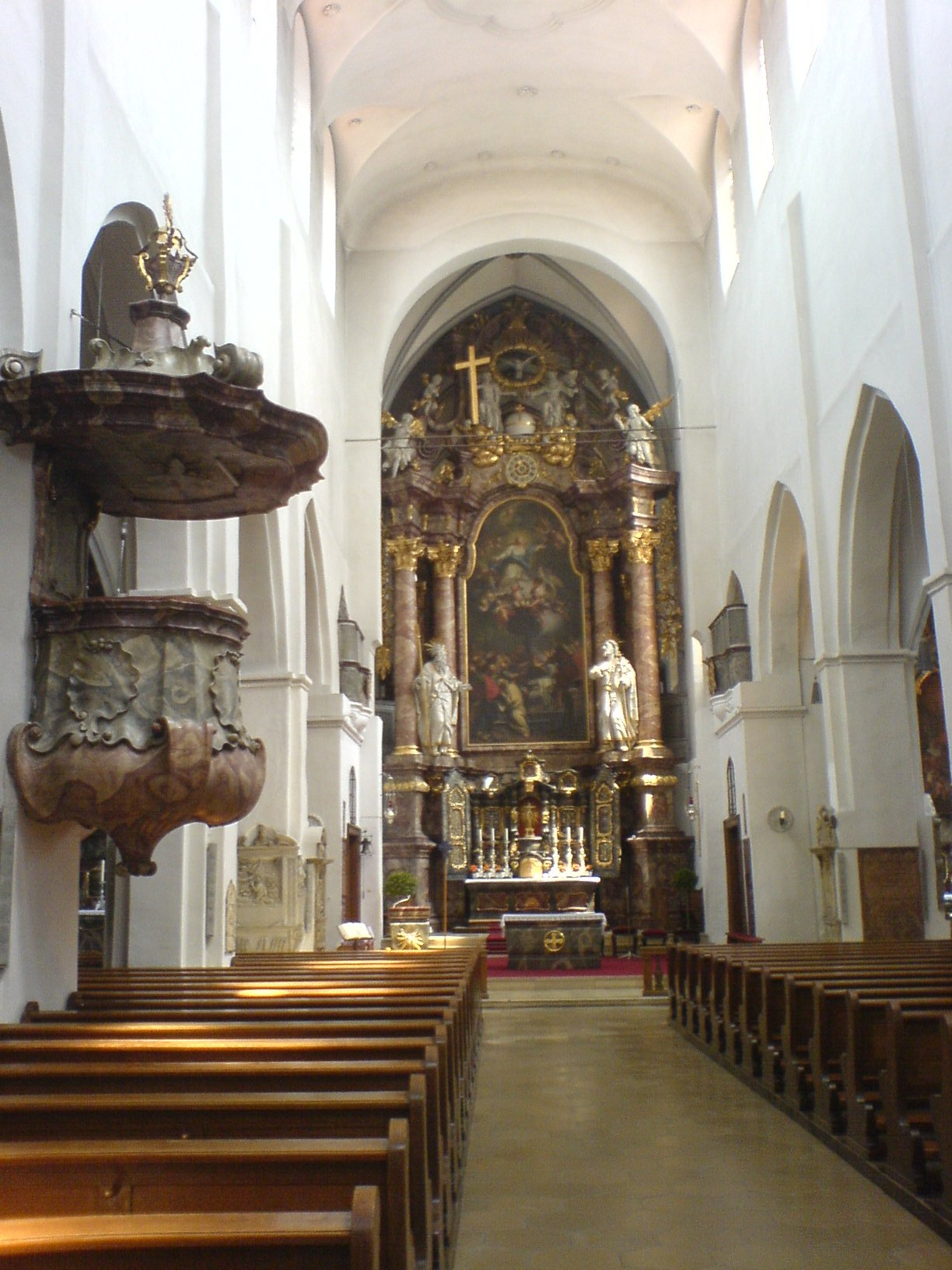 Mittelschiff der Franzsikanerkirche Ingolstadt